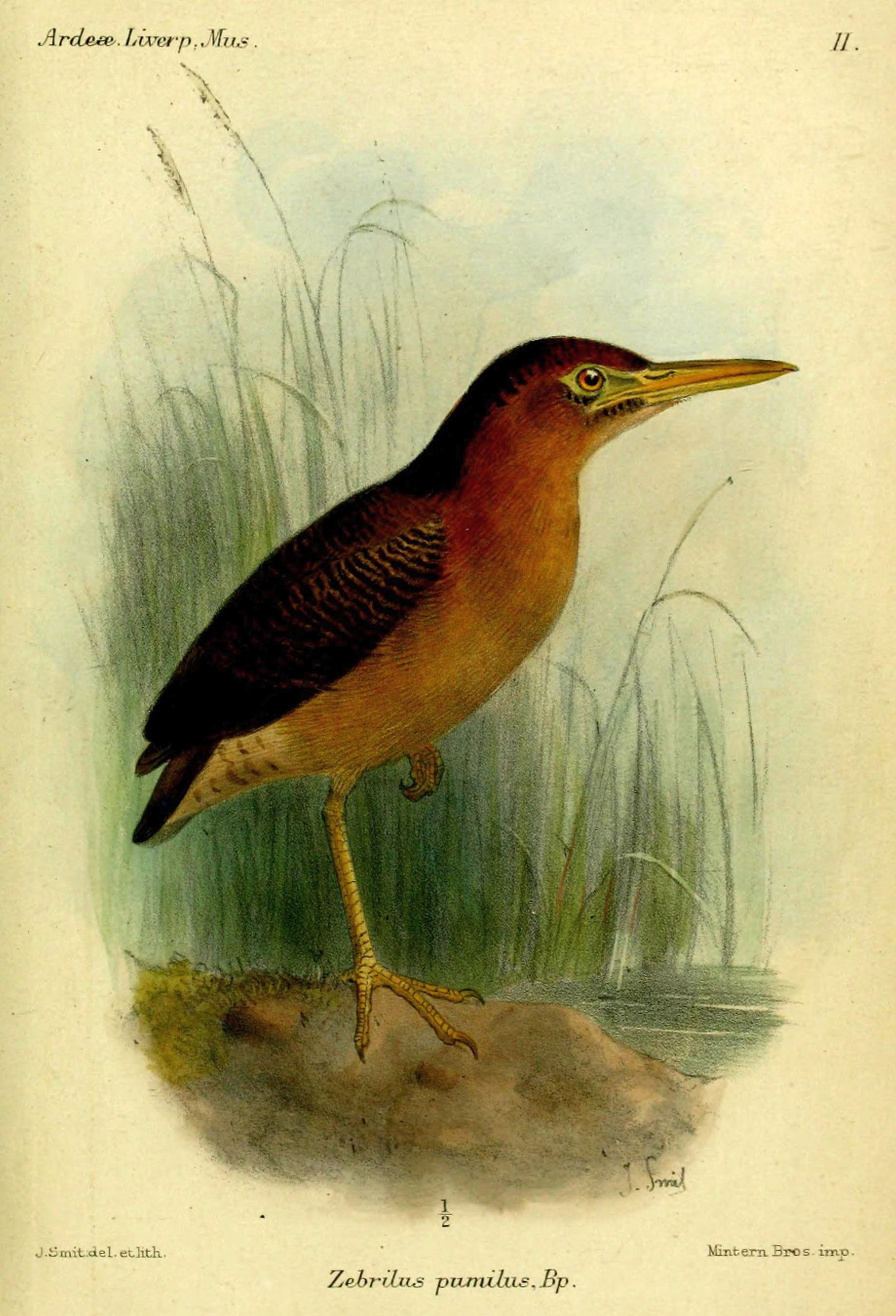 Zebrilus pumilus = syn. Zebrilus undulatus[1]